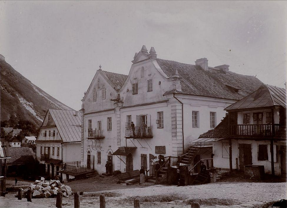 Вулиця у Кременці, 2 пол. 19 ст.